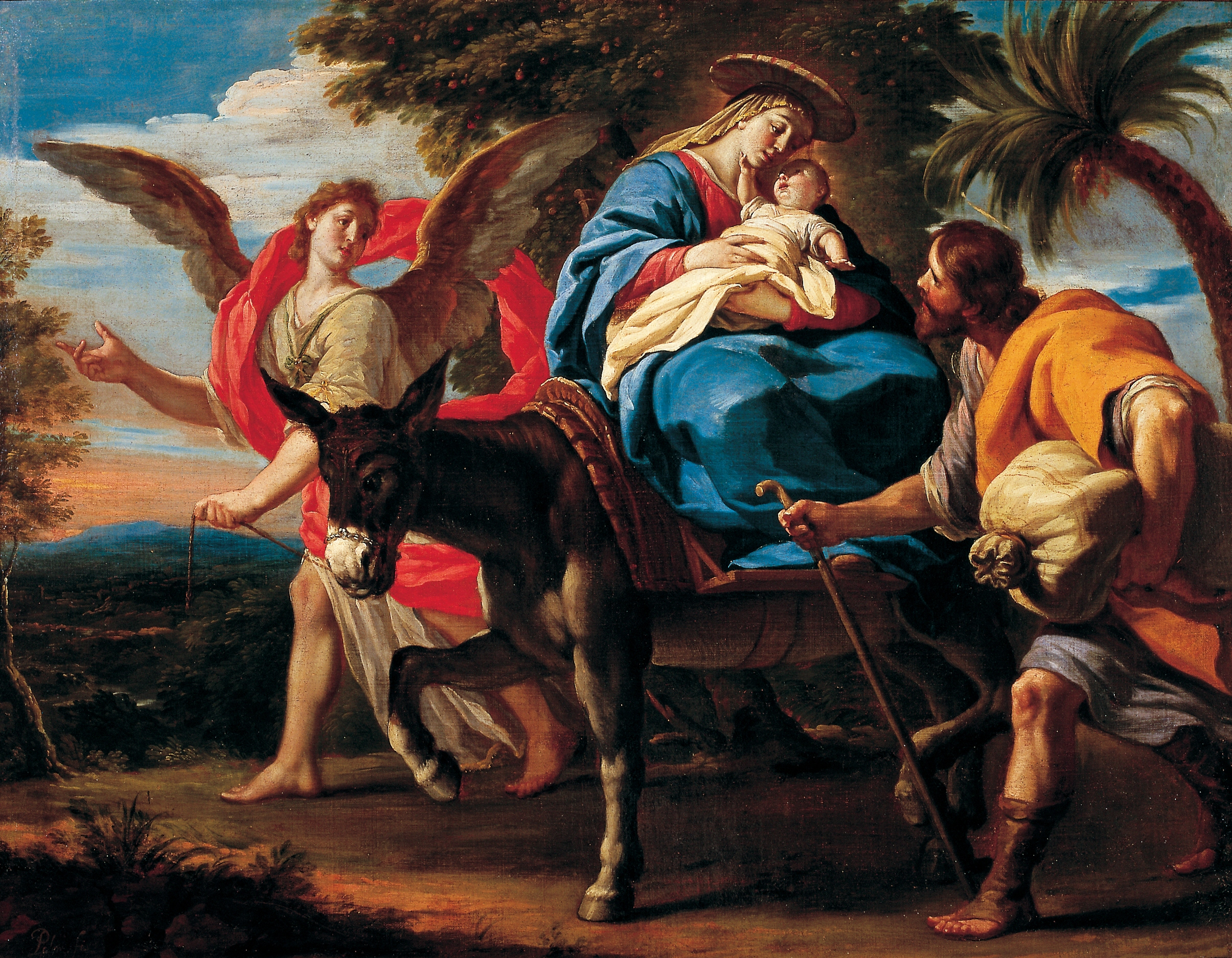 La obra representa el momento en que San José, la Virgen María y el Niño Jesús huyeron a Egipto para salvar a este último de ser asesinado por el rey Herodes el Grande.